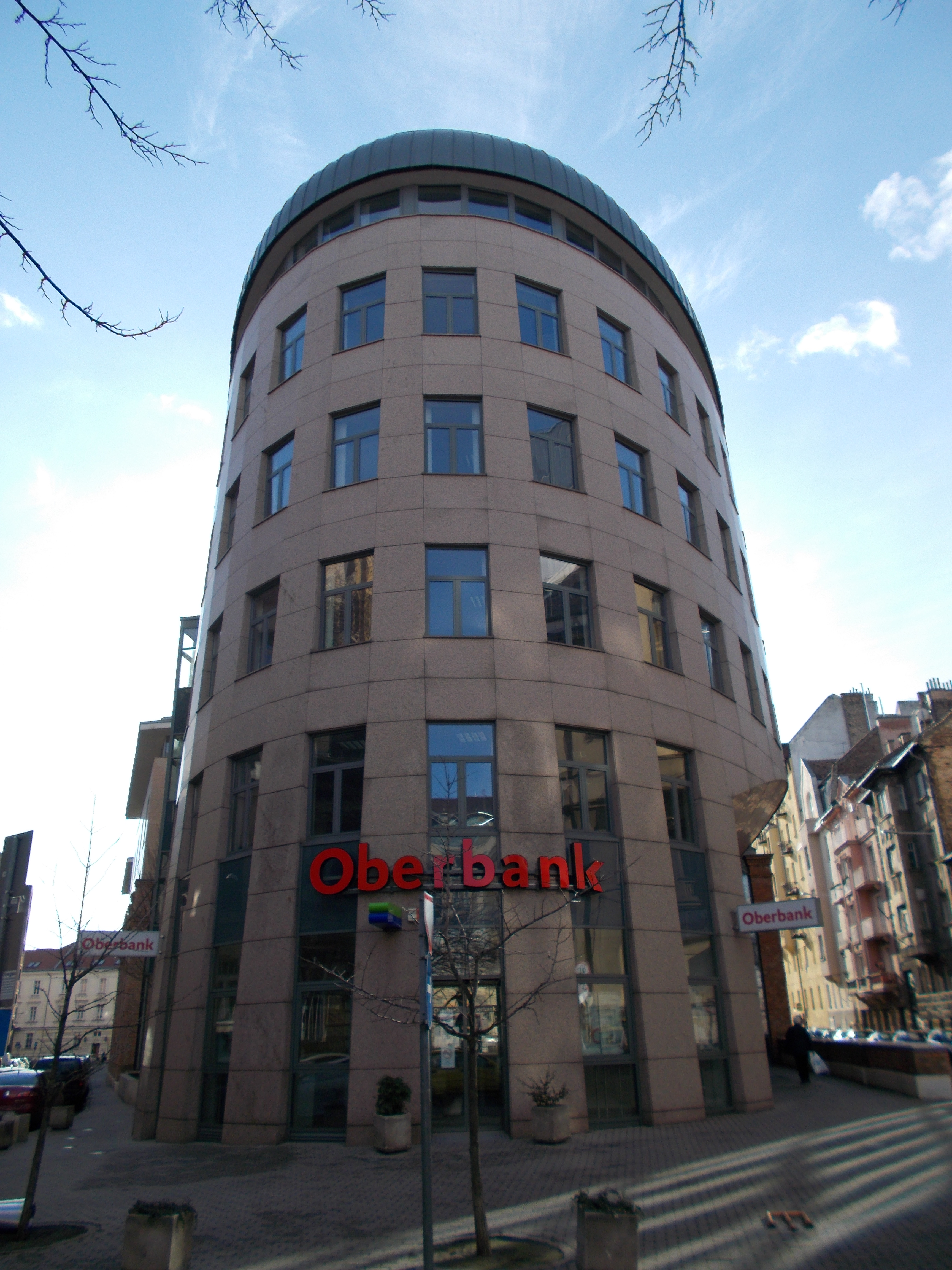 Oberbank. Margit Palace irodaház (Ekler Dezső 1999-ben tervezte /wikipédia/) része, Építés: 2003 Január? Átadás: 2005 Január [1] PDF, - Budapest, II. kerület, Henger utca 2-16